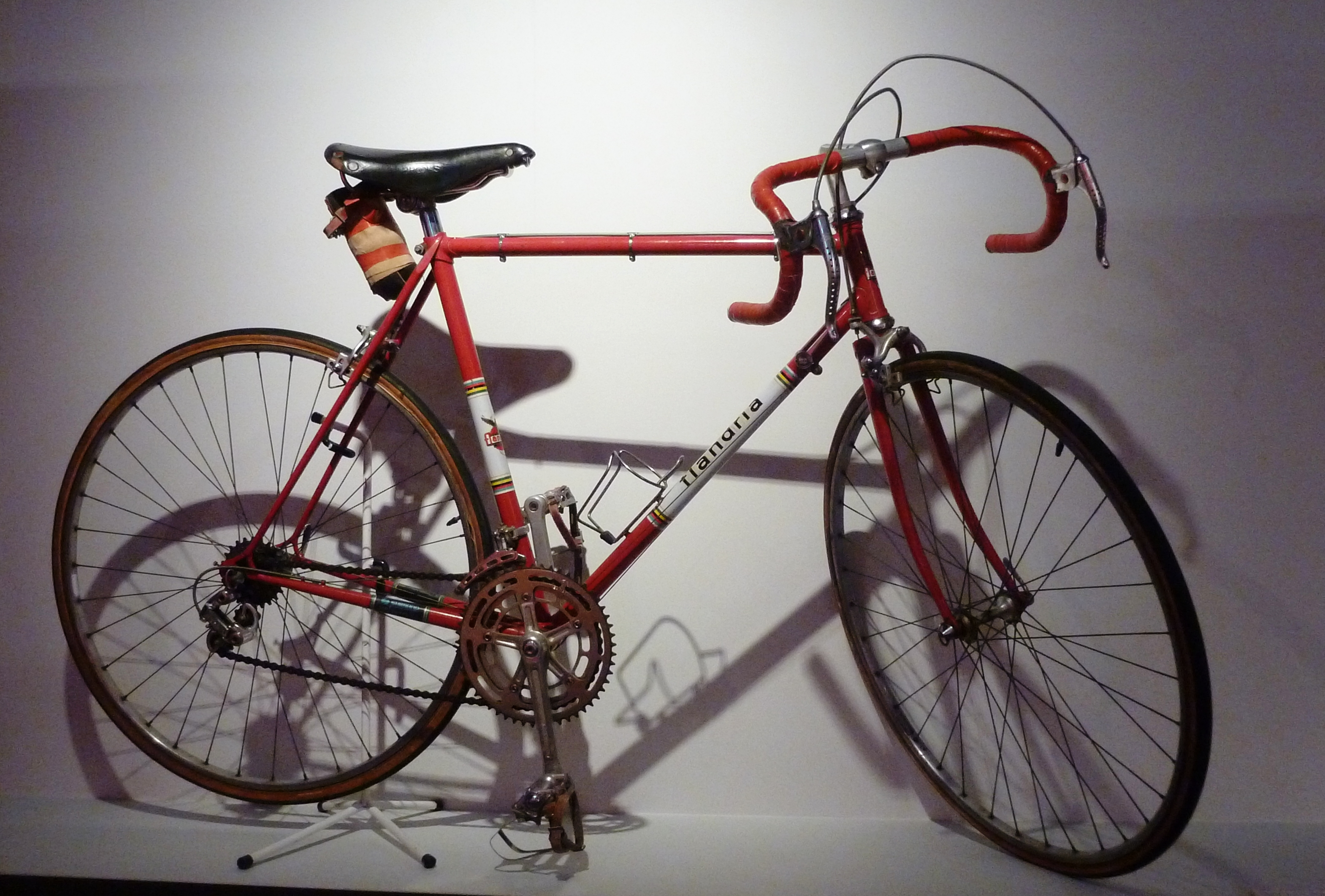 Rennrad von Michel Pollentier (1973), im National Wielermuseum in Roeselaere, Belgien, Marke Flandria